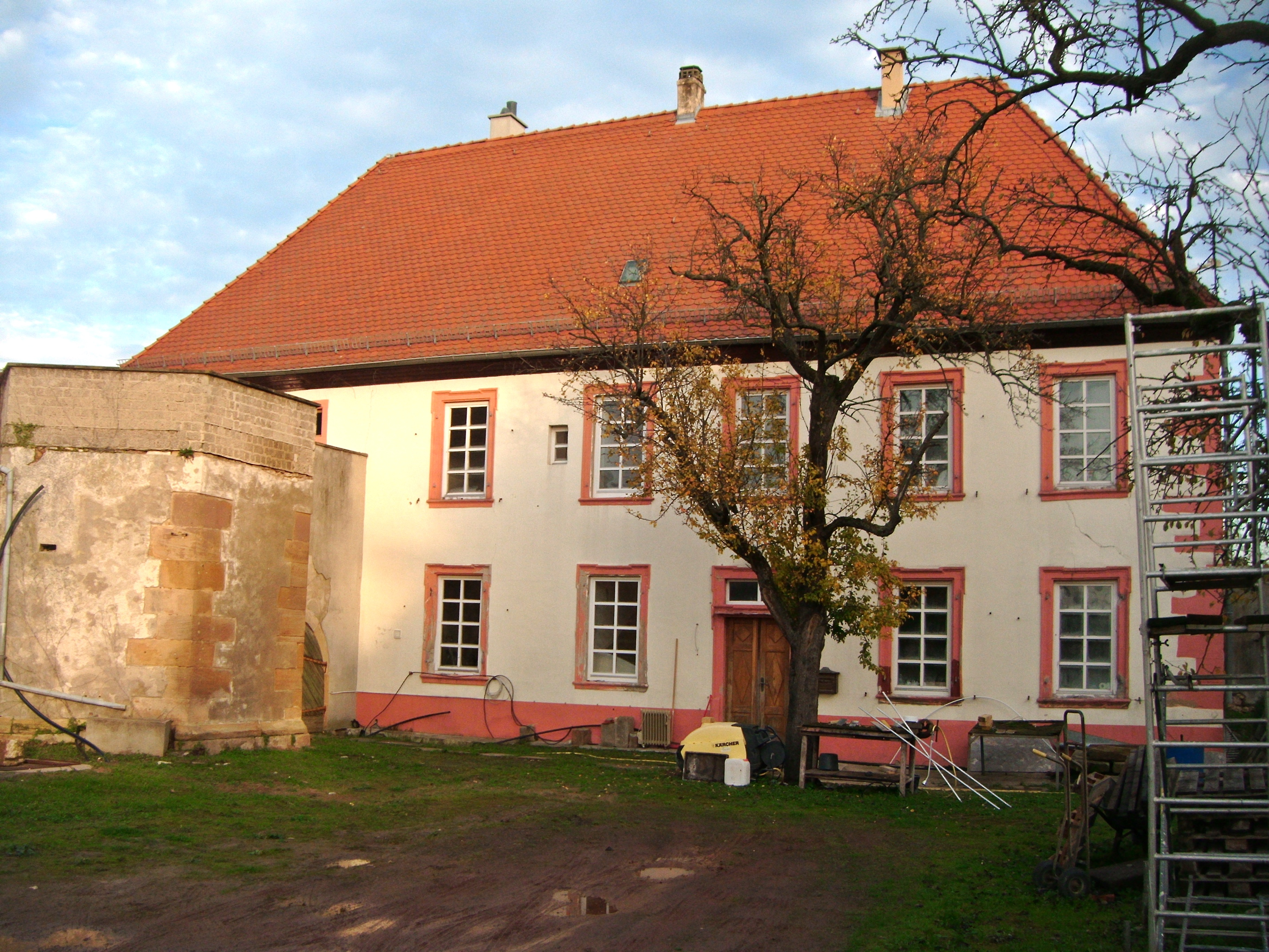 Dirmstein, Bischöfliches Schloss. Amtshaus und Treppenturmrest, vom Innenhof aus